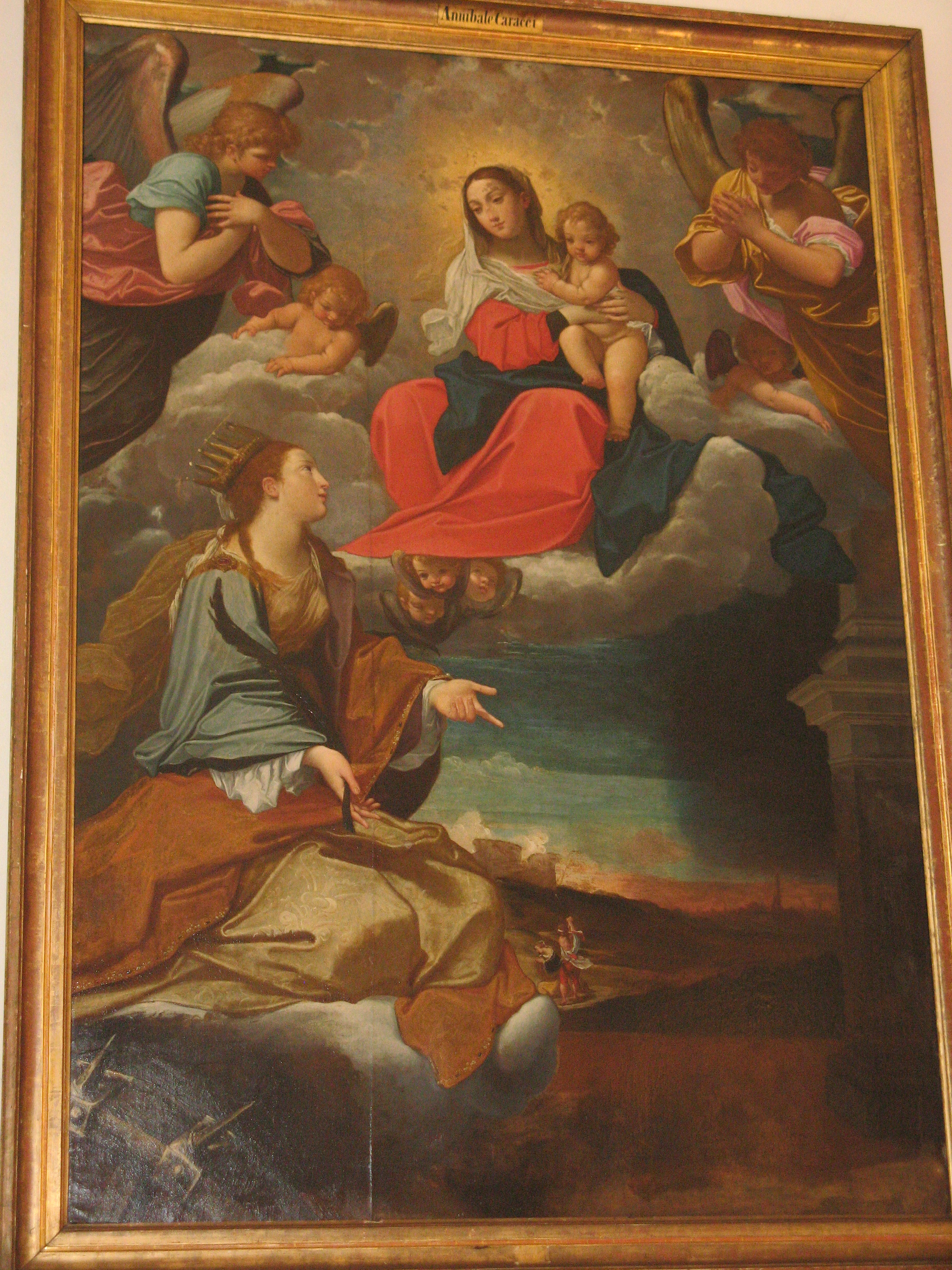 Hl. Katharina vor der Madonna, Ölbild Anfang 17. Jh., Annibale Carracci zugeschrieben, Pfarrkirche St. Katharina, Langenzersdorf, Niederösterreich